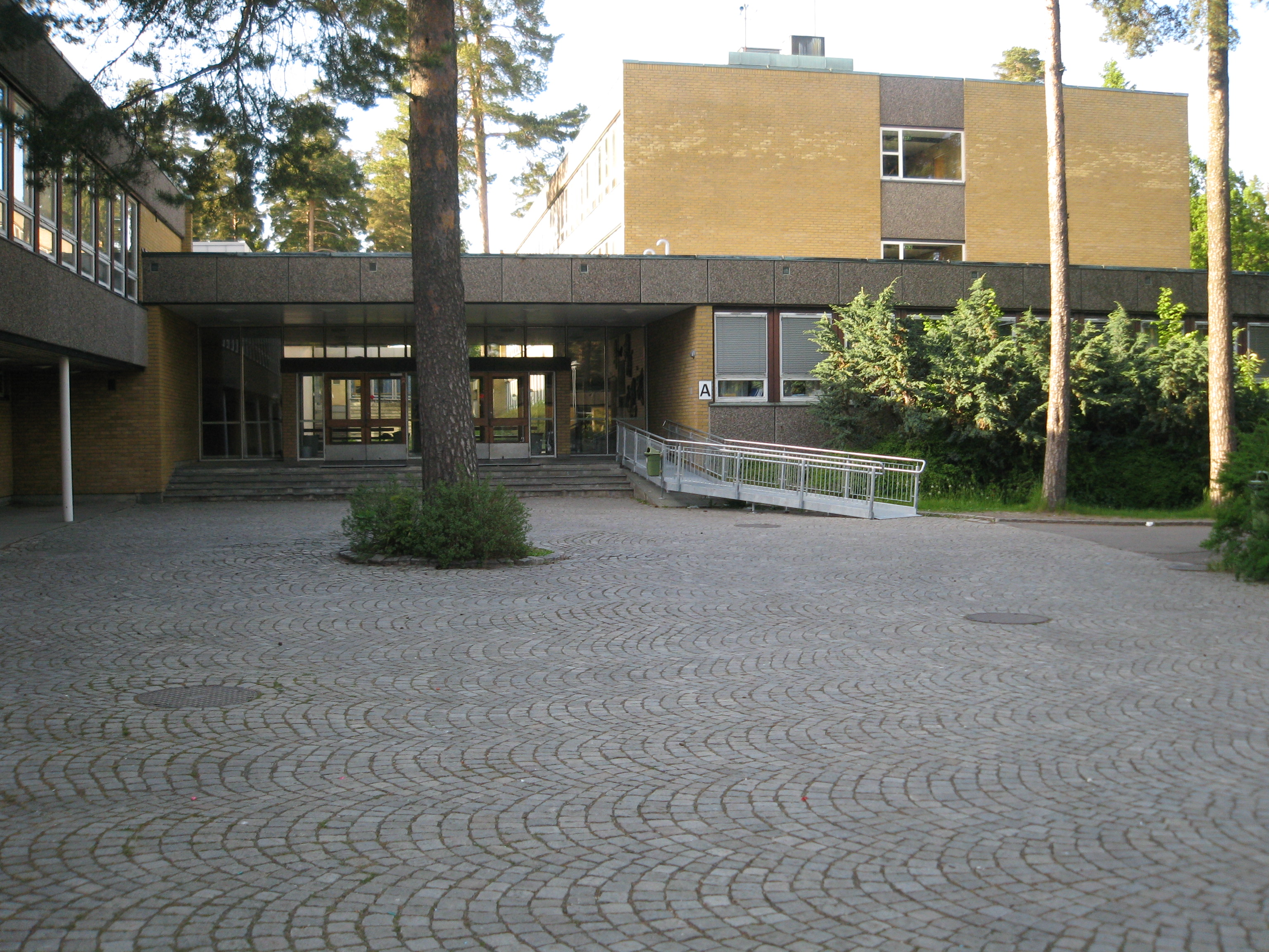 Byskogen skole - hovedinngangen